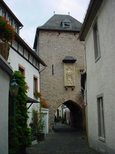 Blankenheim Fotografiert Juli 2004 Reinhard Kraasch Copyright Status: GNU Freie Dokumentationslizenz